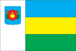 Прапор Срібнянського району Чернігівської області України